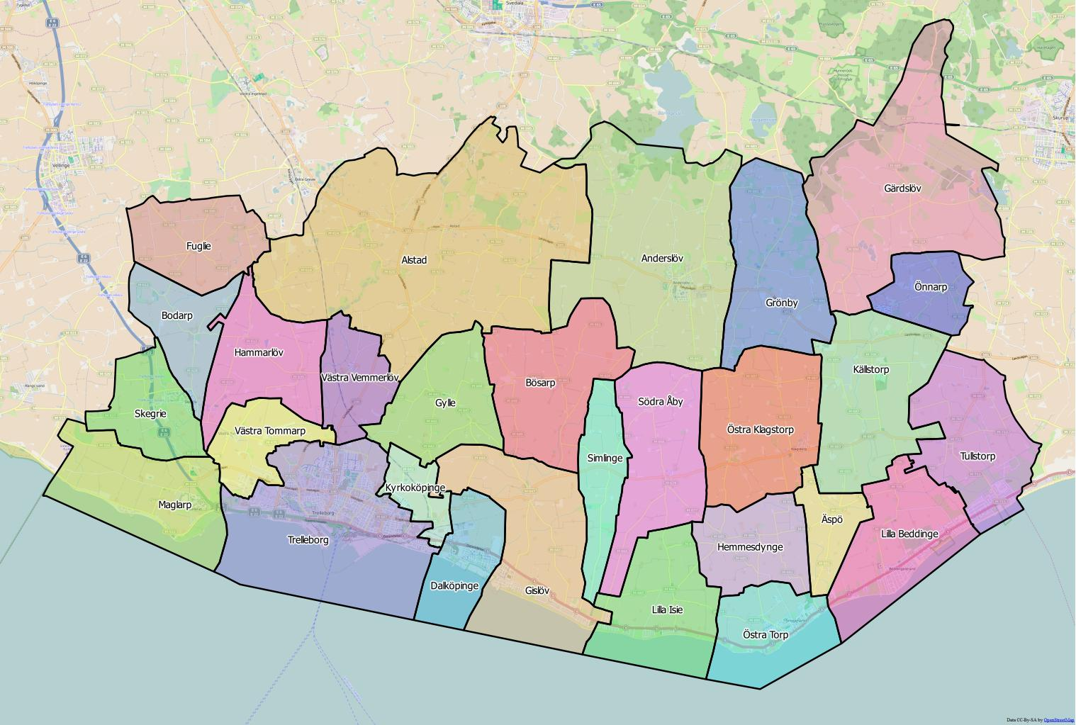 Distriktsindelningen i Trelleborgs kommun World file: 38.0040285958037245 0 0 -38.0040285958037245 1446107.82102397503331304 7462641.30076221376657486 .